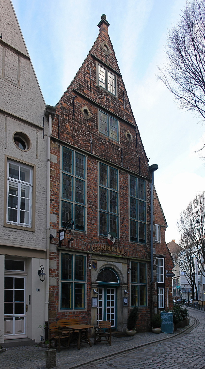 Bremen: Concordenhaus im Schnoor. Erbaut um 1630Das abgebildete Objekt ist ein geschütztes Kulturdenkmal in der Freien Hansestadt Bremen, mit der Nr. 0605 beim Landesamt für Denkmalpflege registriert.